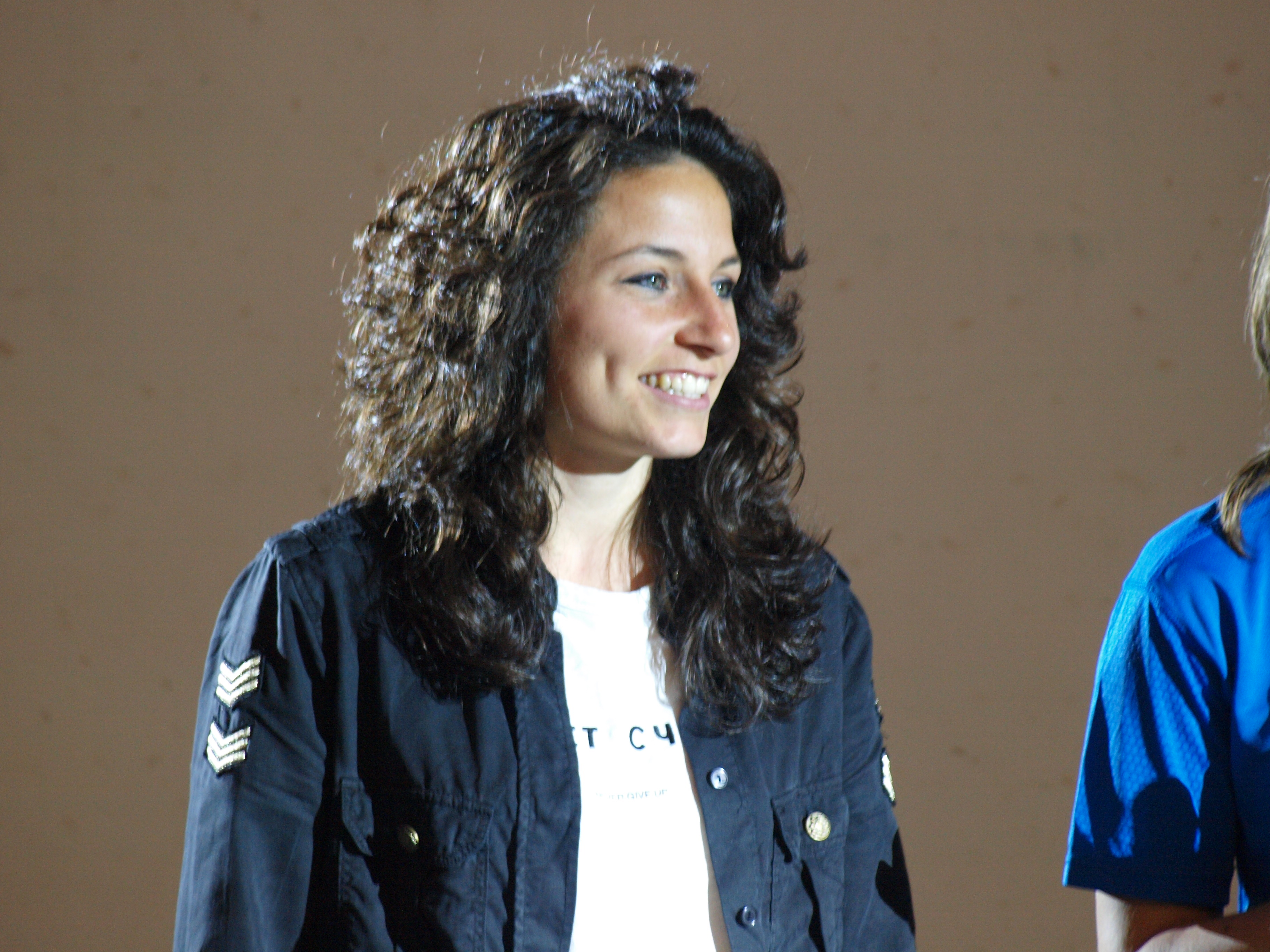 Va de Dona, jornada especial de Raspall femení i mixt organitzada per la FPV al Trinquet de Pelayo.Ivana Andrés, capitana del València CF.